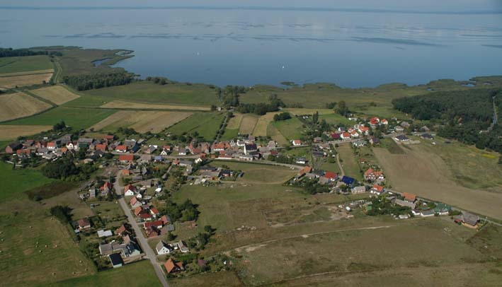 Warsin aus der Vogelperspektive